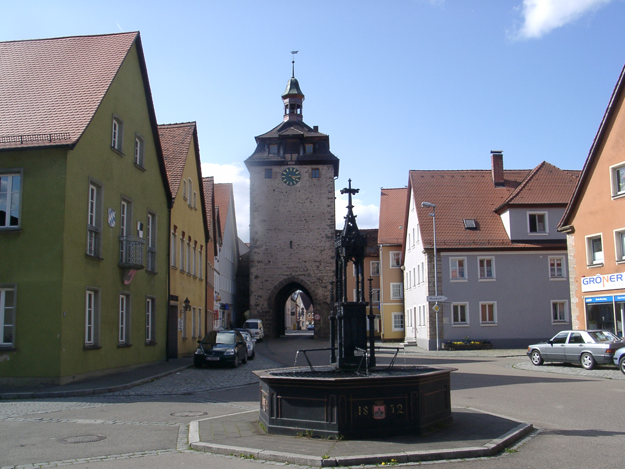 Leutershausen, Am Markt 6: Oberes nördliches Tor mit Brunnen